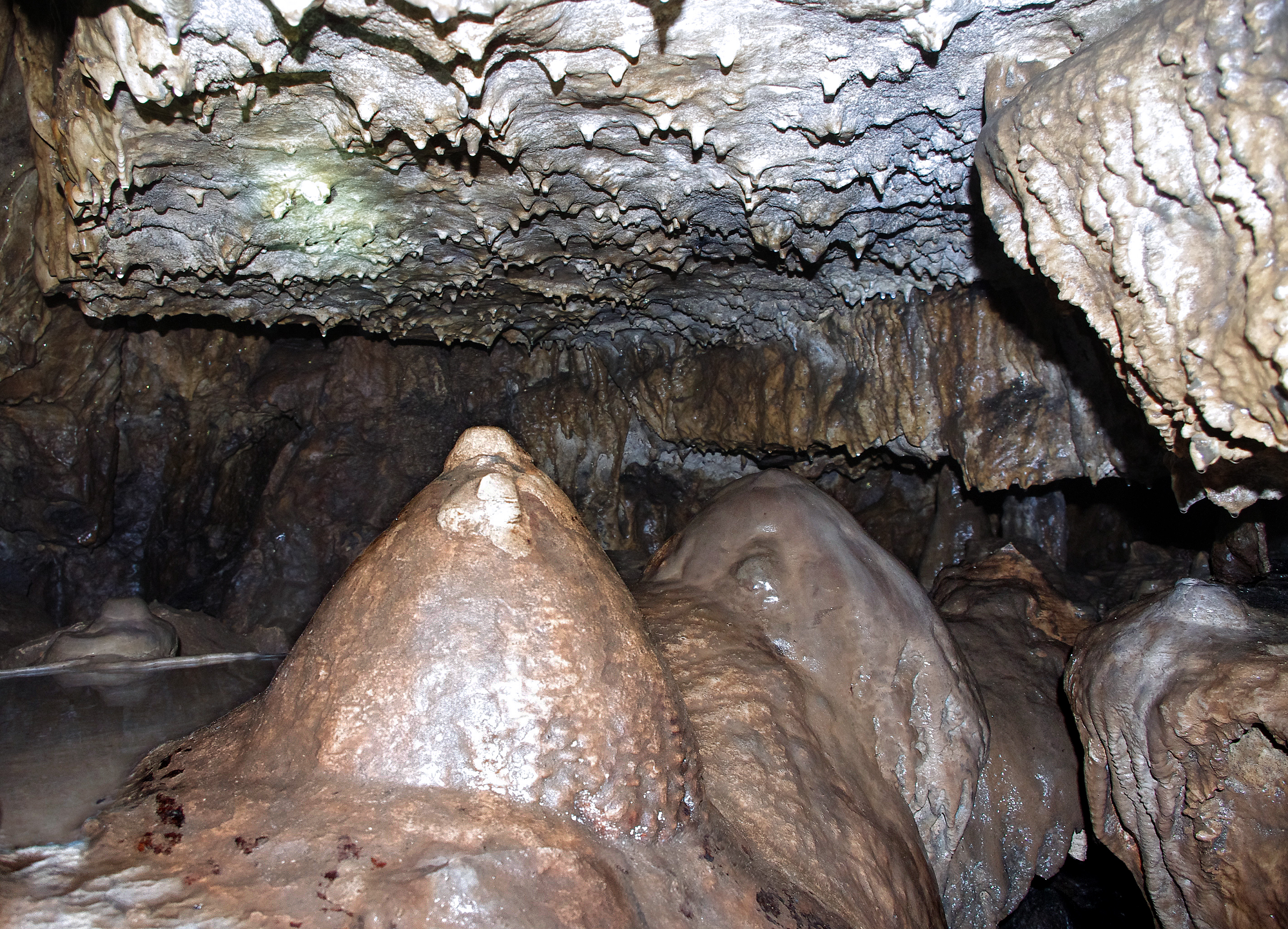 Jaskinia Zbójecka (Góry Świętokrzyskie)